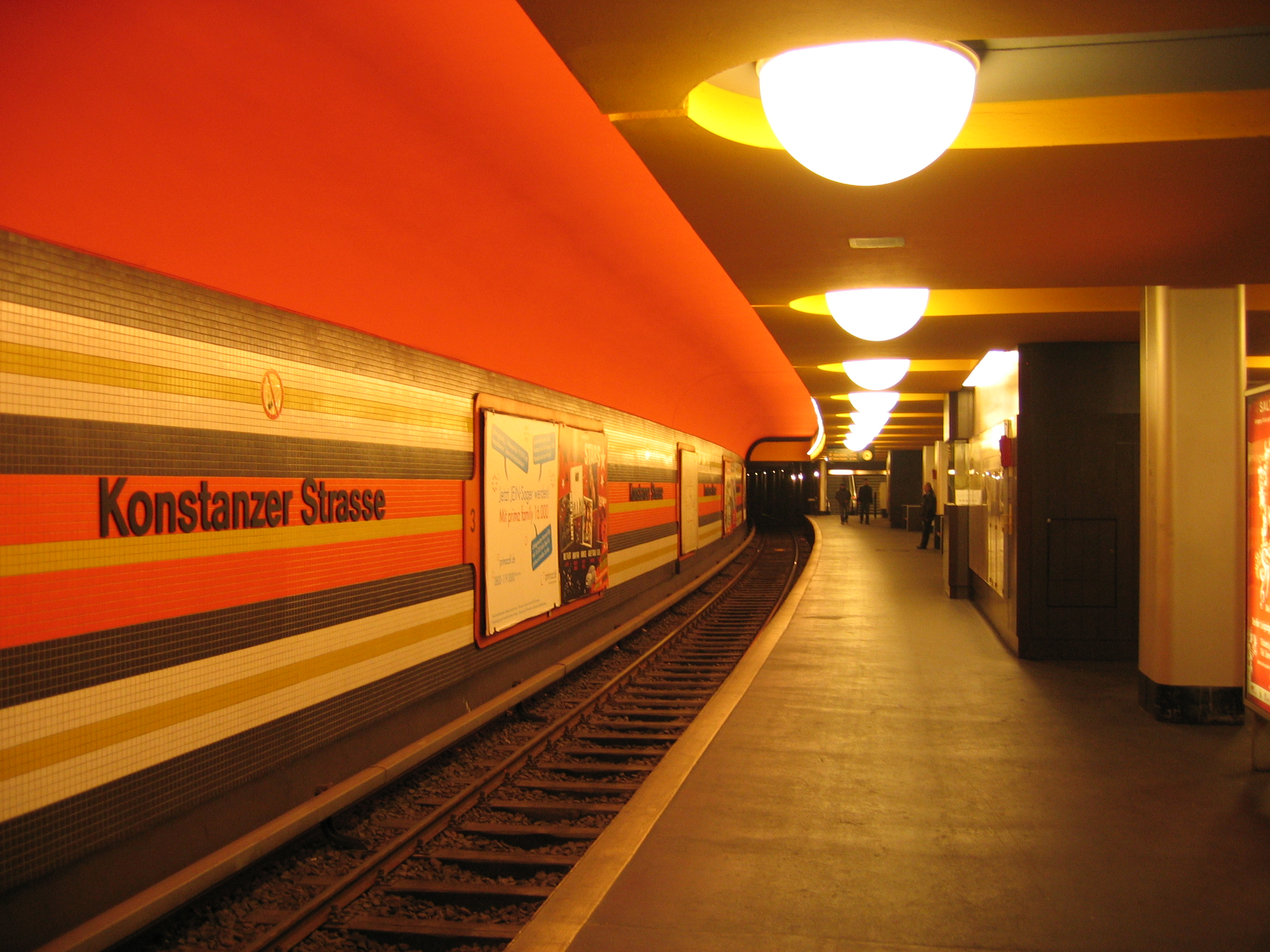 U-Bahnhof Konstanzer Straße, Berlin